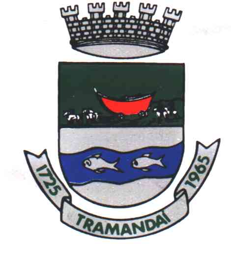 Brasão da Prefeitura Municipal de Tramandaí